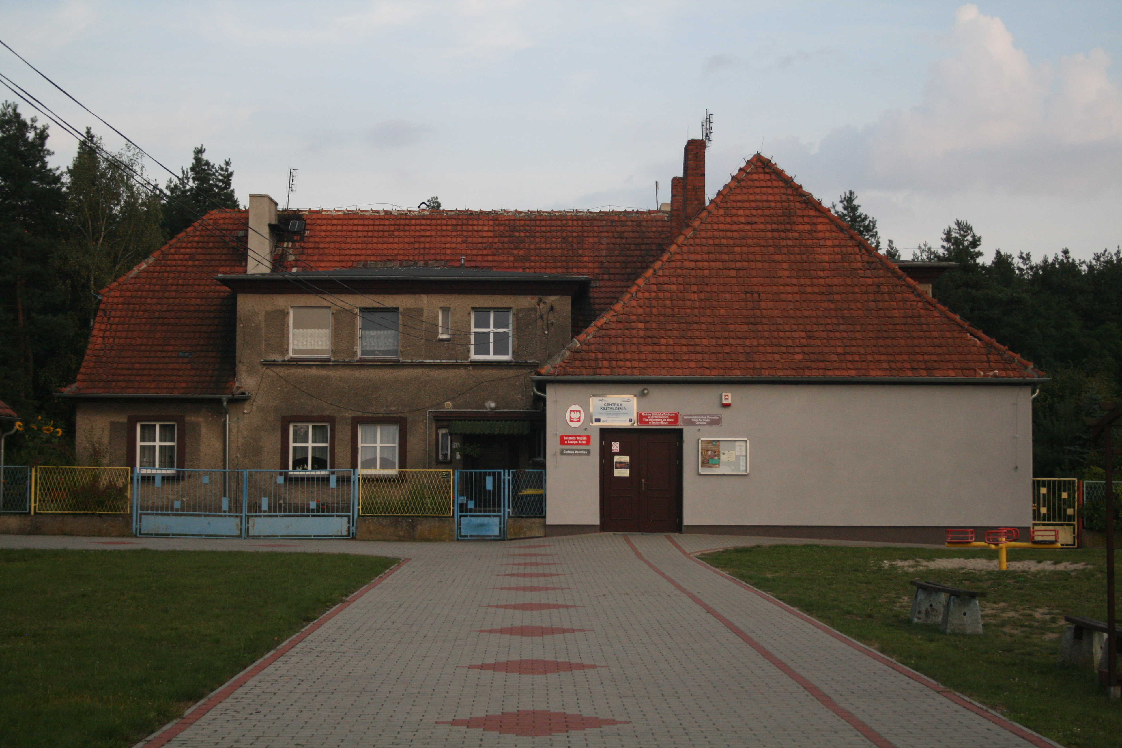 Budynek szkoły oraz budynek mieszkalny, Suchy Bór